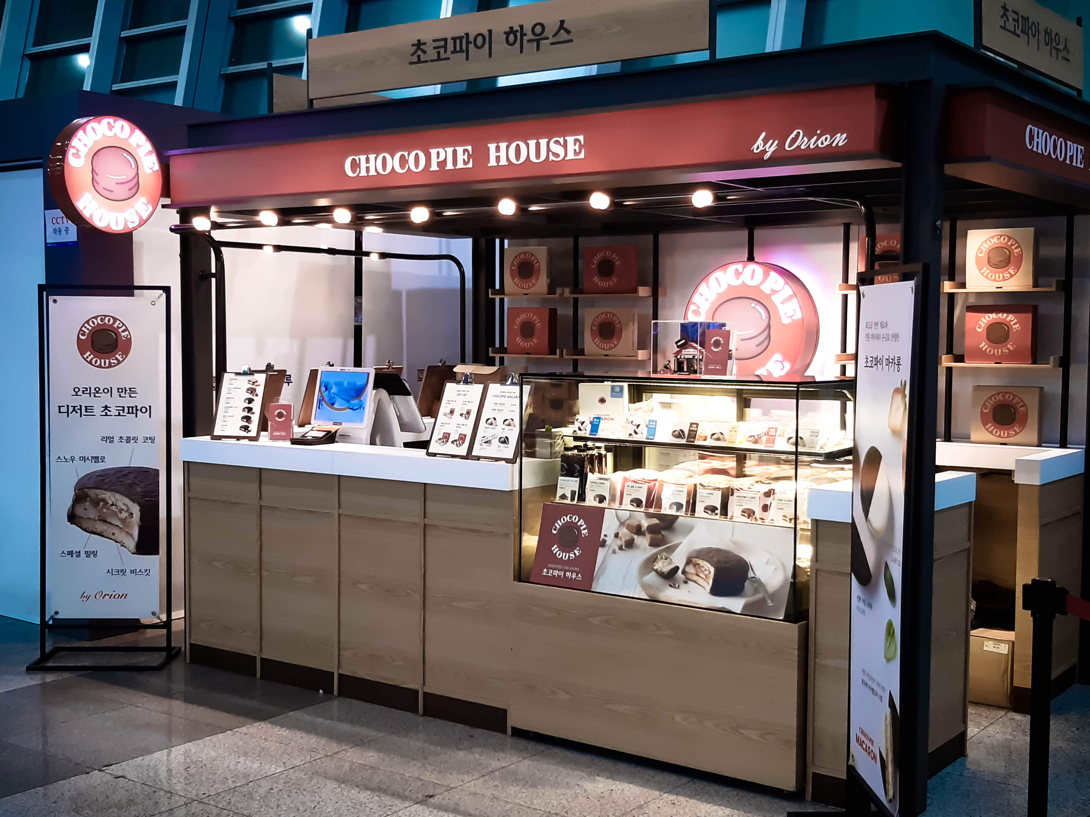 초코파이 가게입니다.